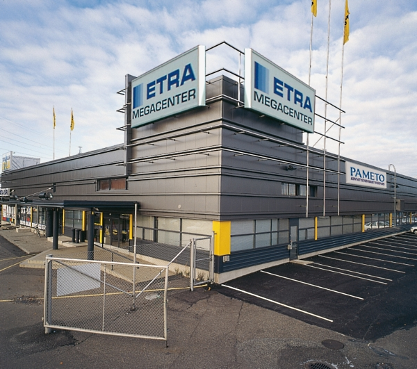 Etran Megacenter Turussa.